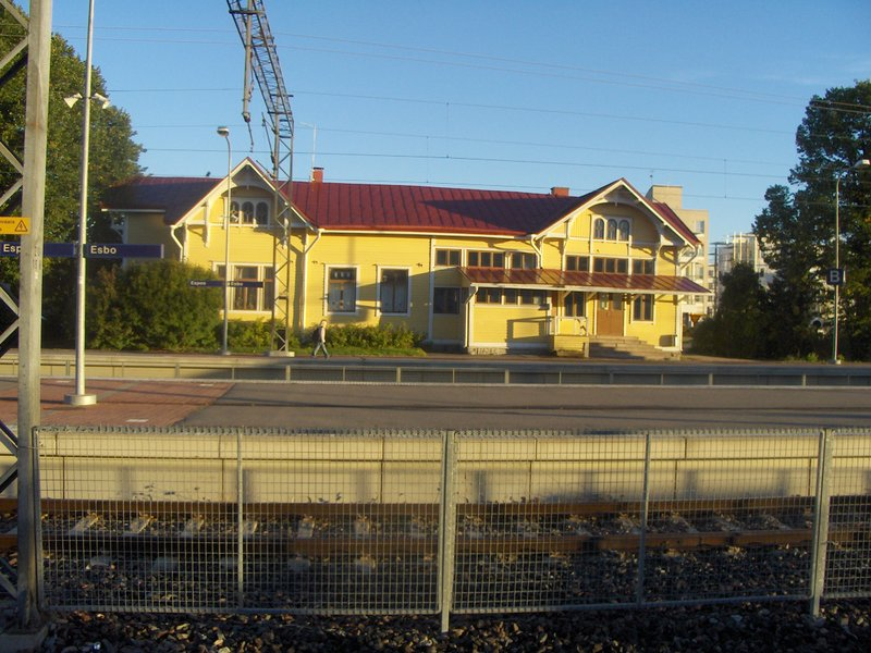 Espoon keskuksen vanha asematalo